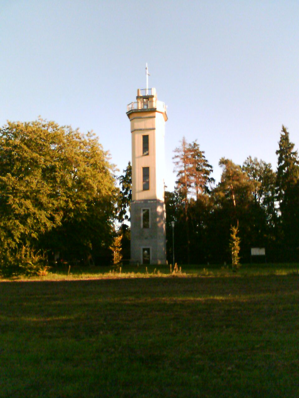 Aussichtsturm auf dem Monumentberg in Groß-Radisch